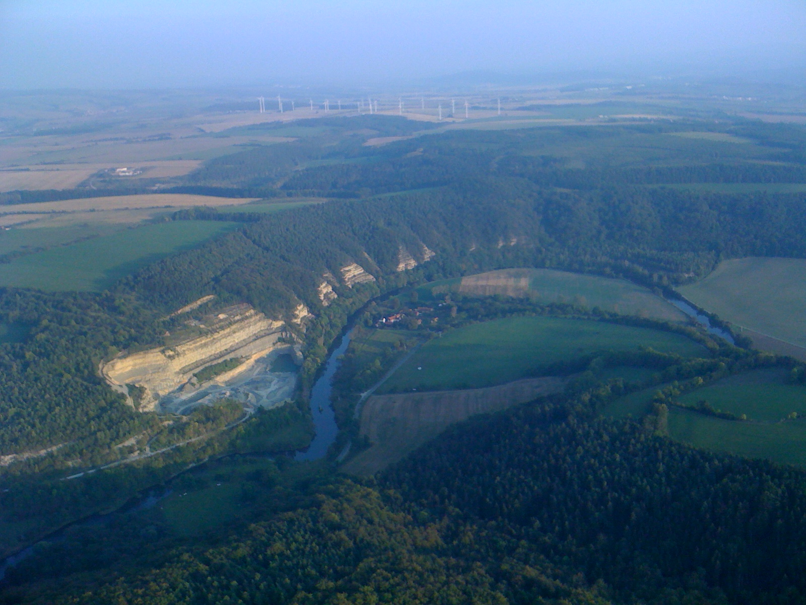 Buchenau Werra